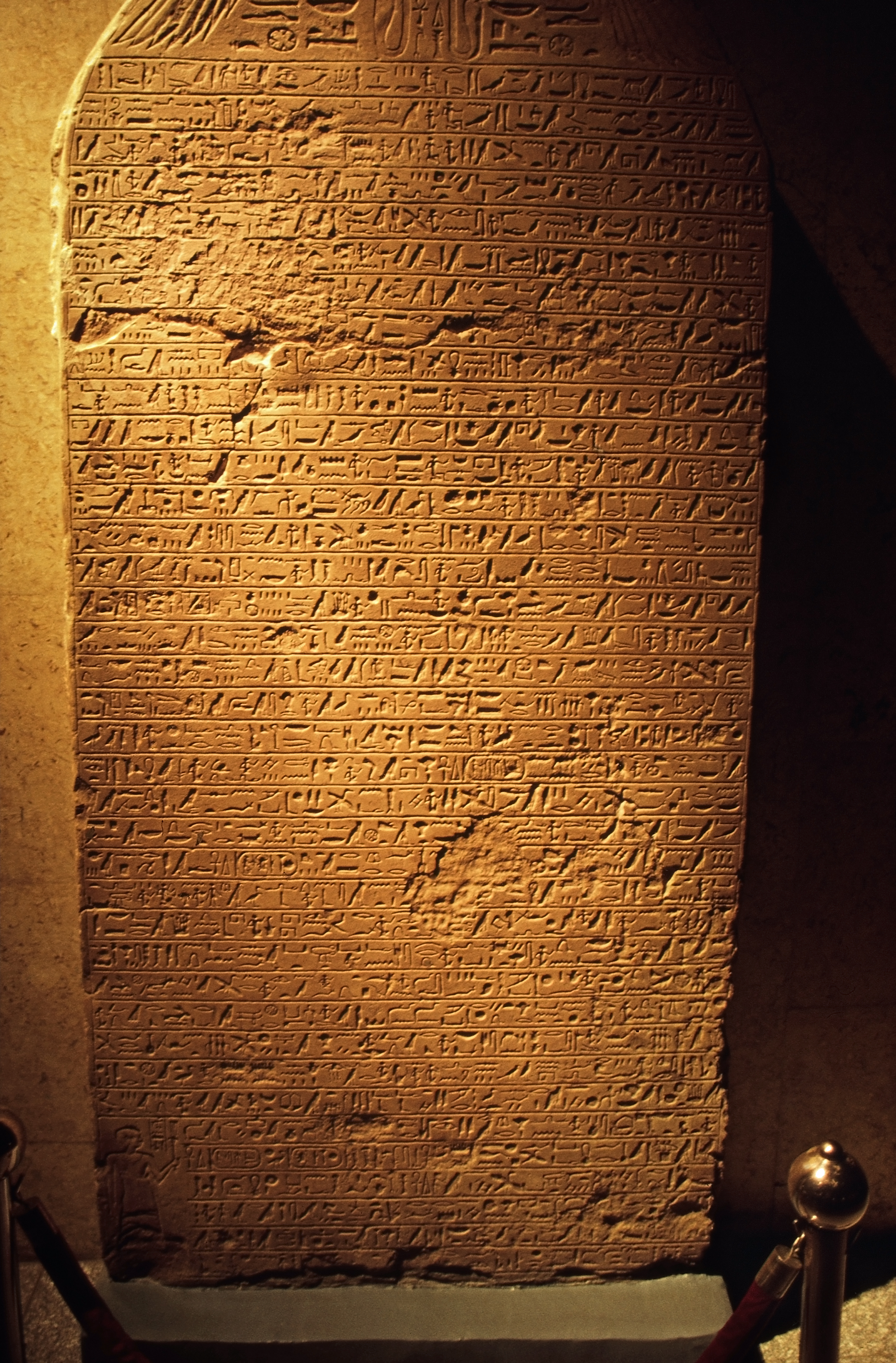 Im Luxor-Museum: Die zweite Stele des Pharaos Kamose berichten von seinen Feldzügen gegen die Hyksos.